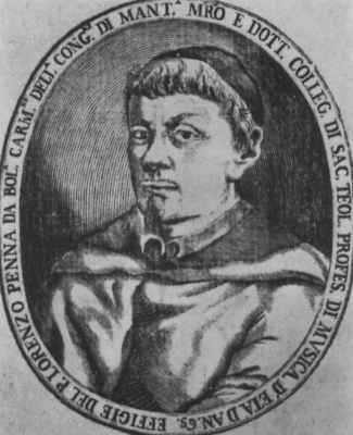 Lorenzo Penna (* 1613 in Bologna; † 31. Oktober 1693 ebenda), italienischer Komponist und Musiktheoretiker, nach einem zeitgenössischem Holzschnitt